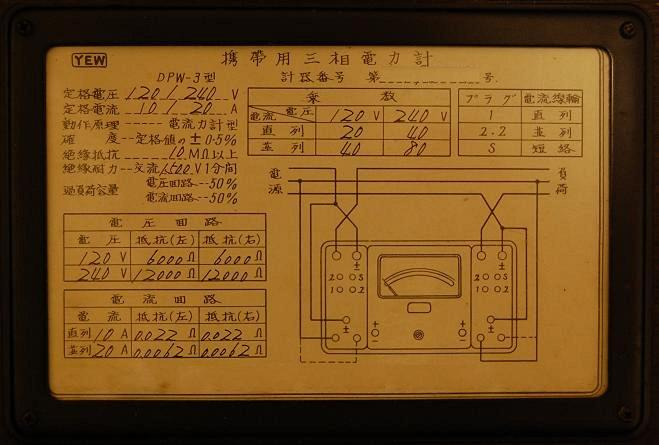 Wattmeters